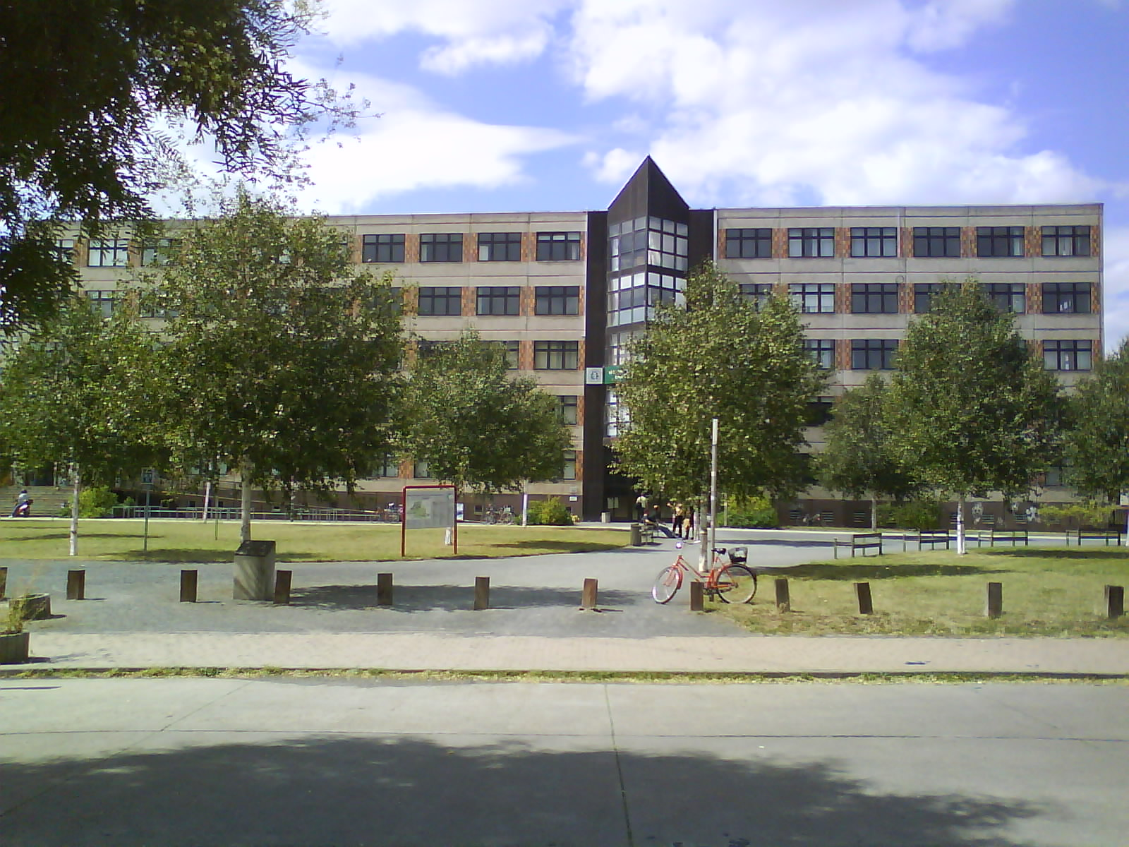 fakultät für geistes-, sozial- und erziehungswissenschaften uni magdeburg